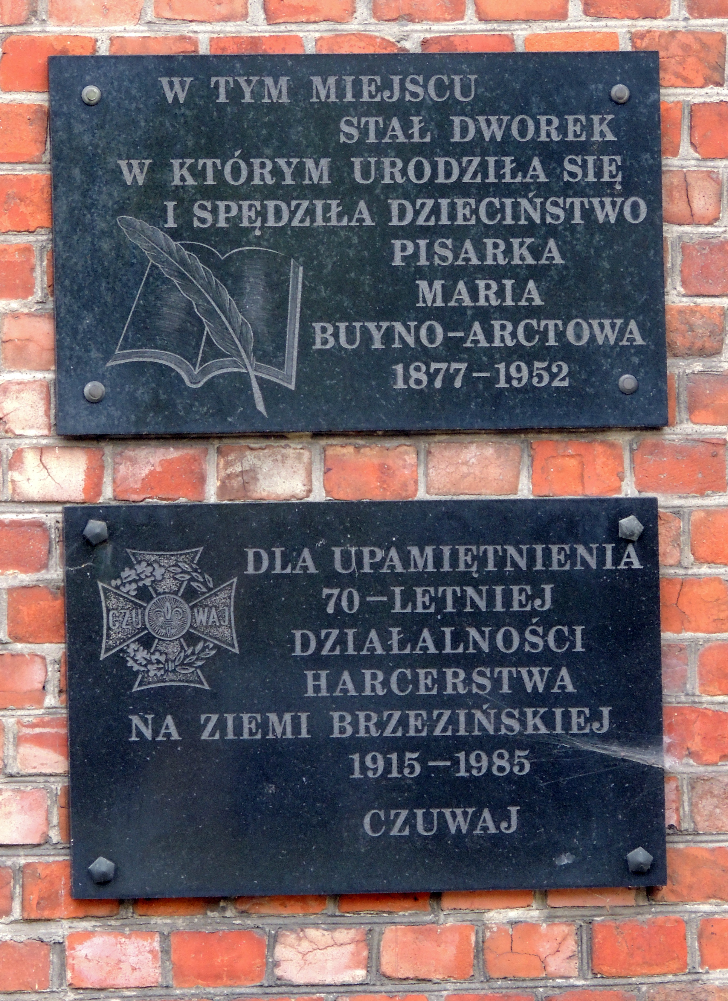 Pałacyk, pocz. XX w., nr 430 oficyna, nr 449 ul. Piłsudskiego 49, Brzeziny, miasto